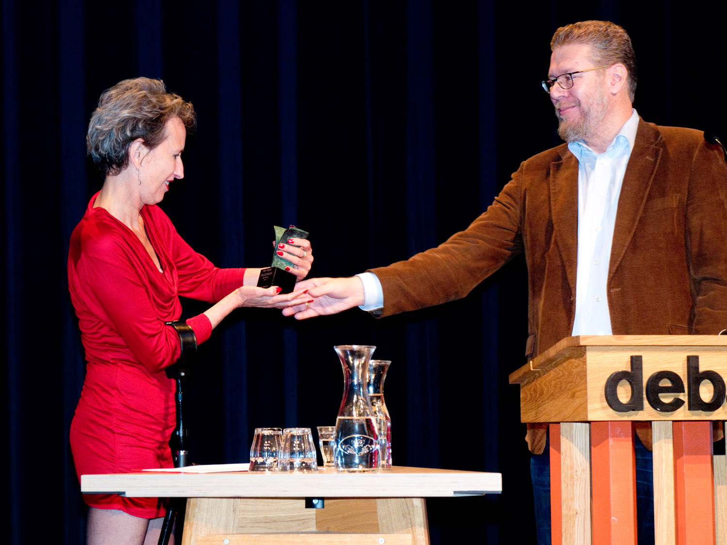 Publiciste Karin Spaink wordt door Fabian van Langevelde, voorzitter van De Vrije Gedachte, uitgeroepen tot Vrijdenker van het jaar 2015. Amsterdam, De Balie, 10 oktober 2015.